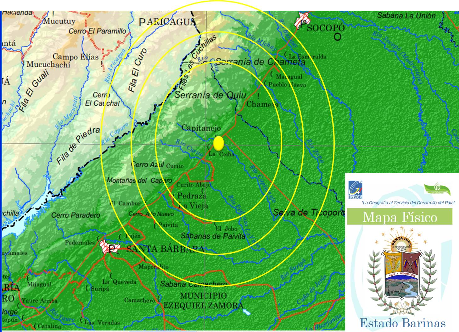 Ubicación de la población de Capitanejo. Mapa de Relieve